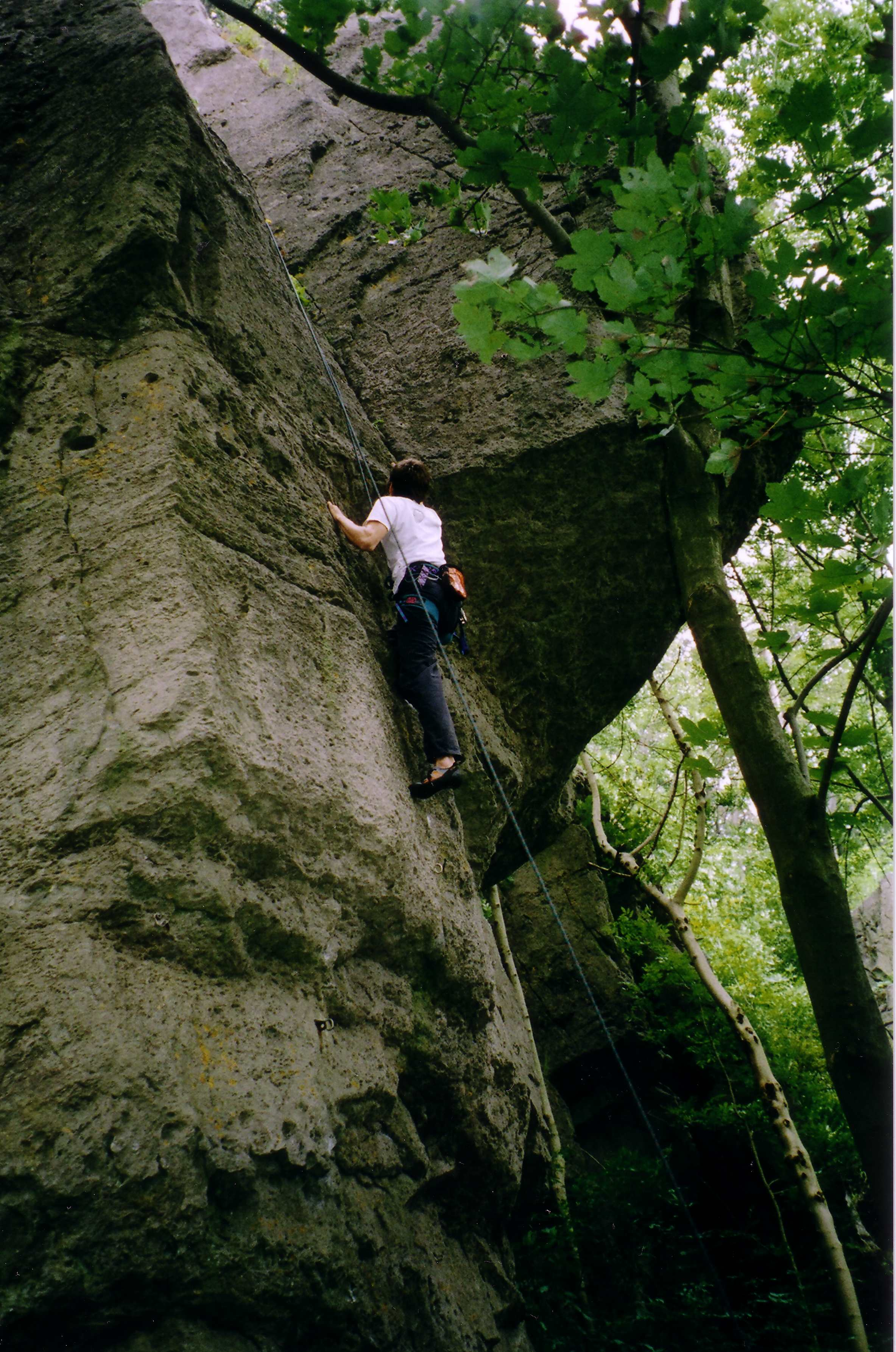 Ein Kletterer an einem Felsen im Ith